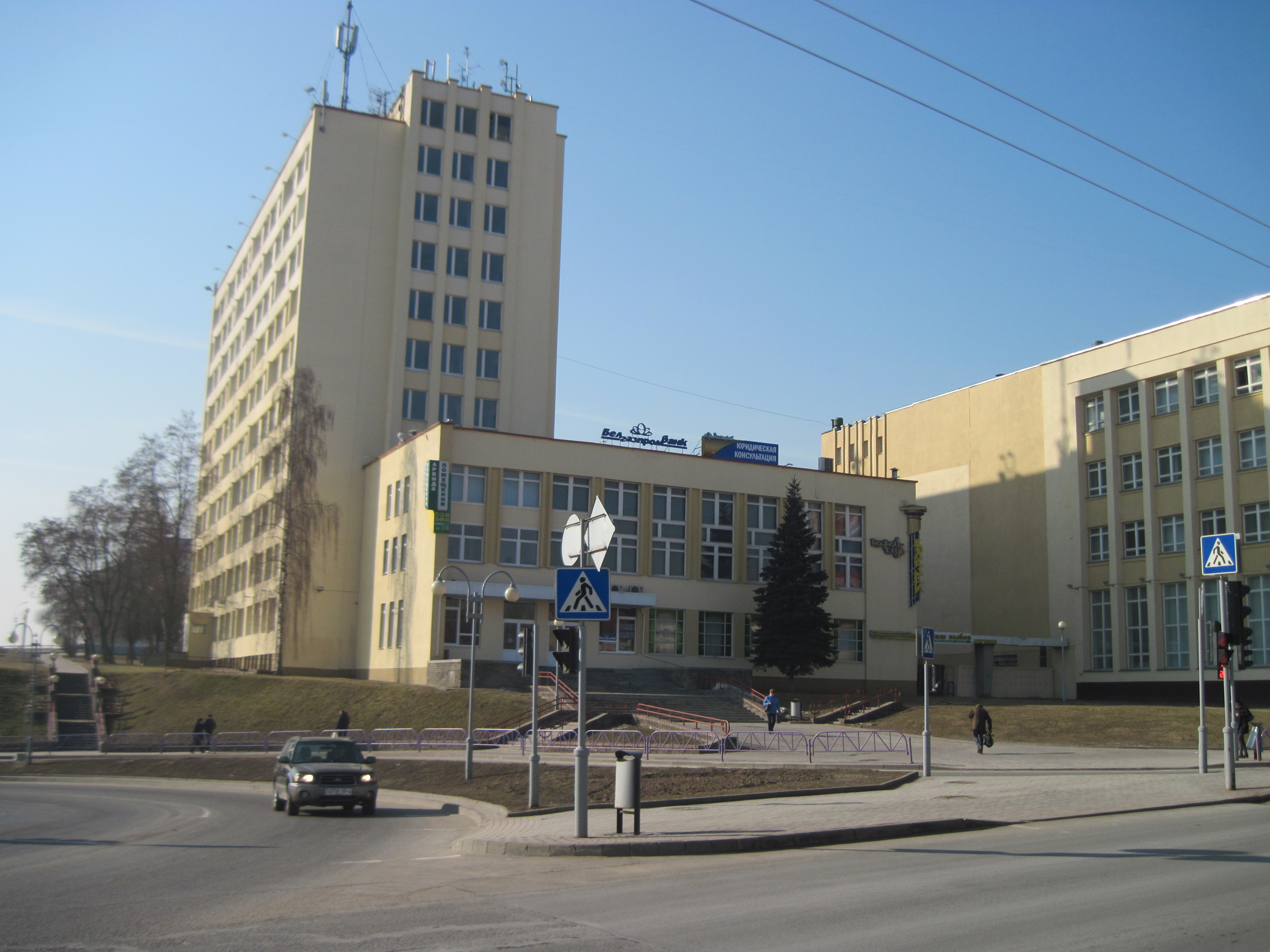 Забудова гістарычнага цэнтра Гродна. Вуліца К. Маркса, 31